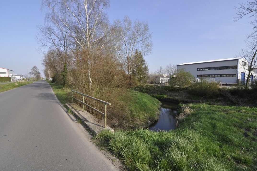 Mündung Teil des Fuchsbachs in Isenach